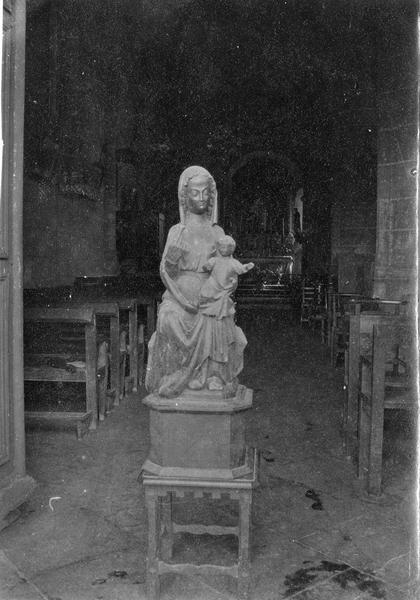 Madonna mit Kind in der Kirche Saint-Saturnin in Rocles (Allier)